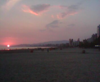 Ocaso (Pôr-do-Sol) em Praia Grande/SP no verão 2012-2013